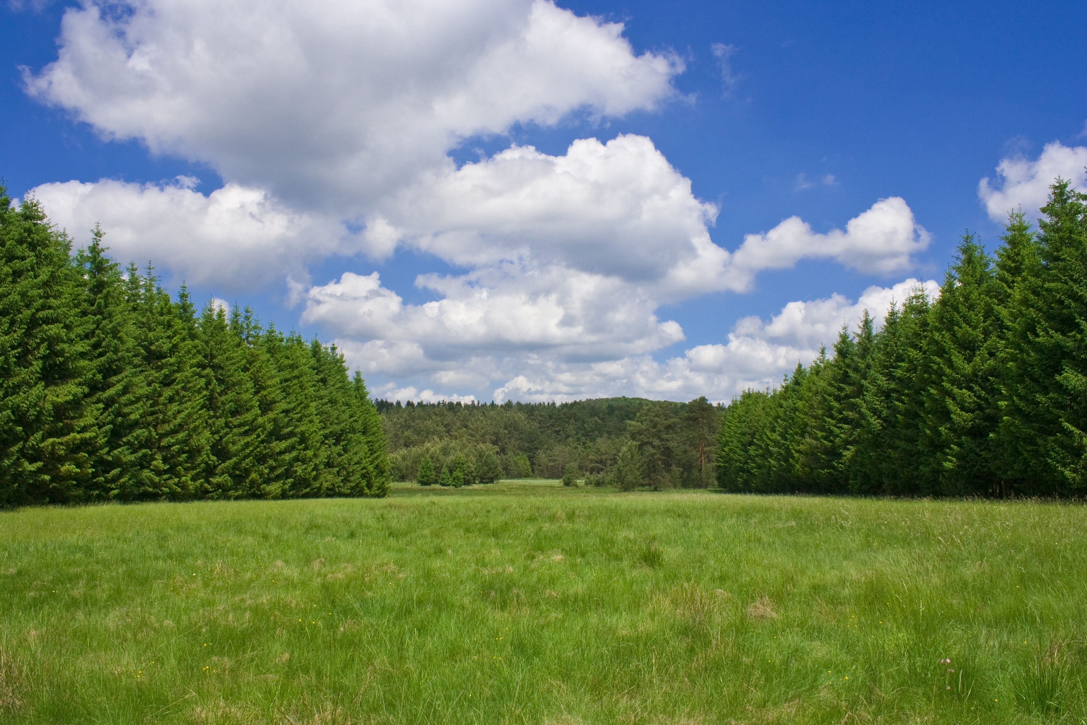 Burgwald – Parzellen auf den Franzosenwiesen mit Fichtenforsten, die Privateigentümern gehören